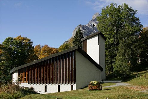 Ref. Kirche in Braunwald